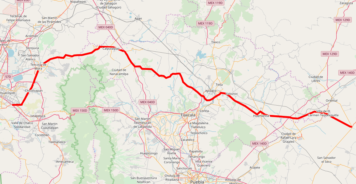 La Carretera Federal 136 en su paso por los estados de México, Tlaxcala y Puebla